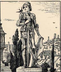 Buchillustration von Walter Crane für The Happy Prince And Other Tales. von Oscar Wilde. Reprint von 1910 nach der Erstausgabe von 1888.